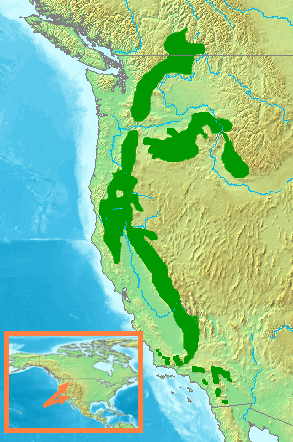 Picoides albolarvatus - Range Map